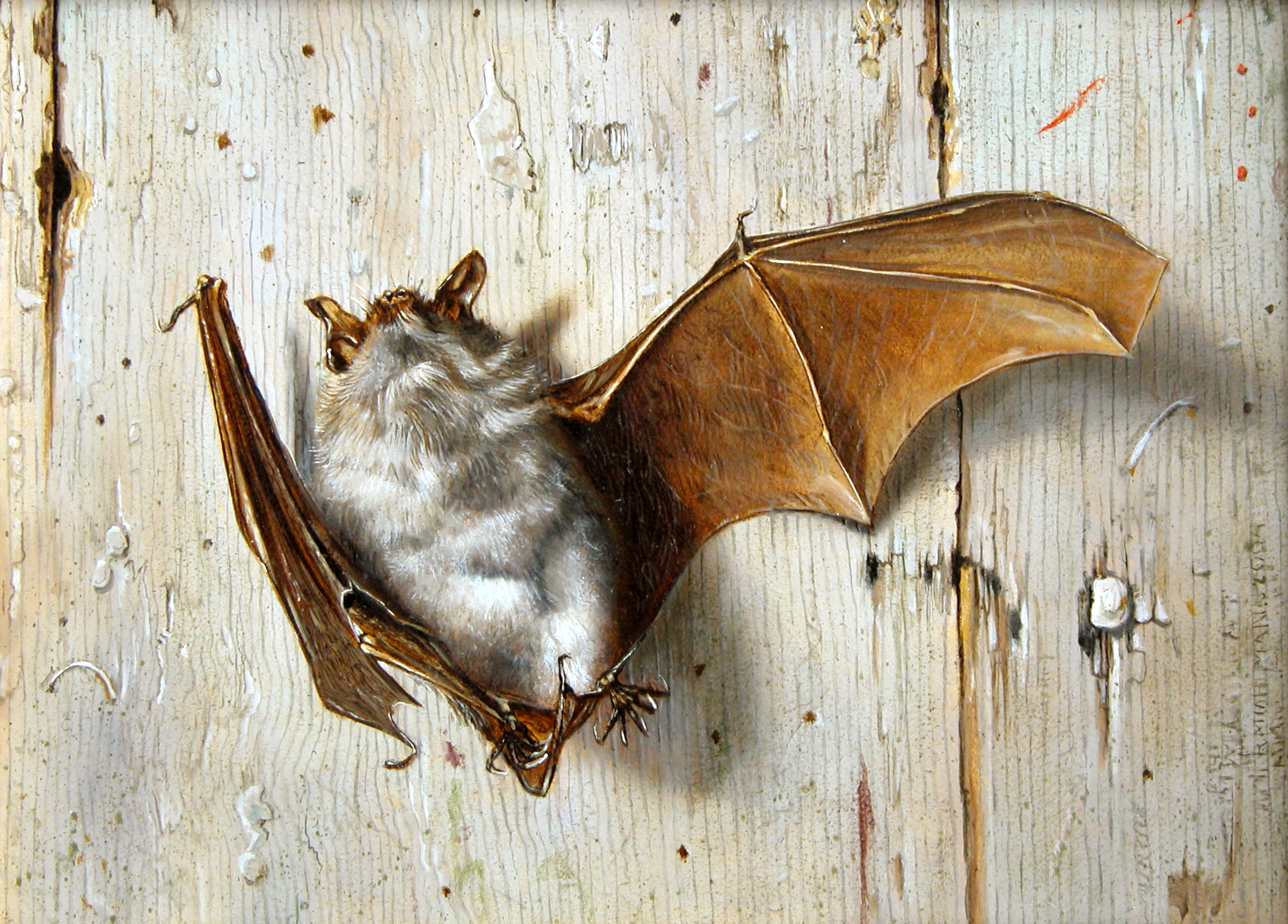 Schilderij vleermuis.